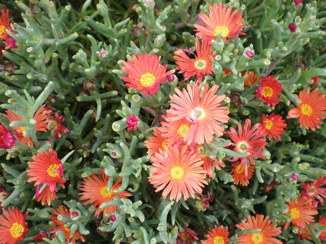 Malephora crocea.